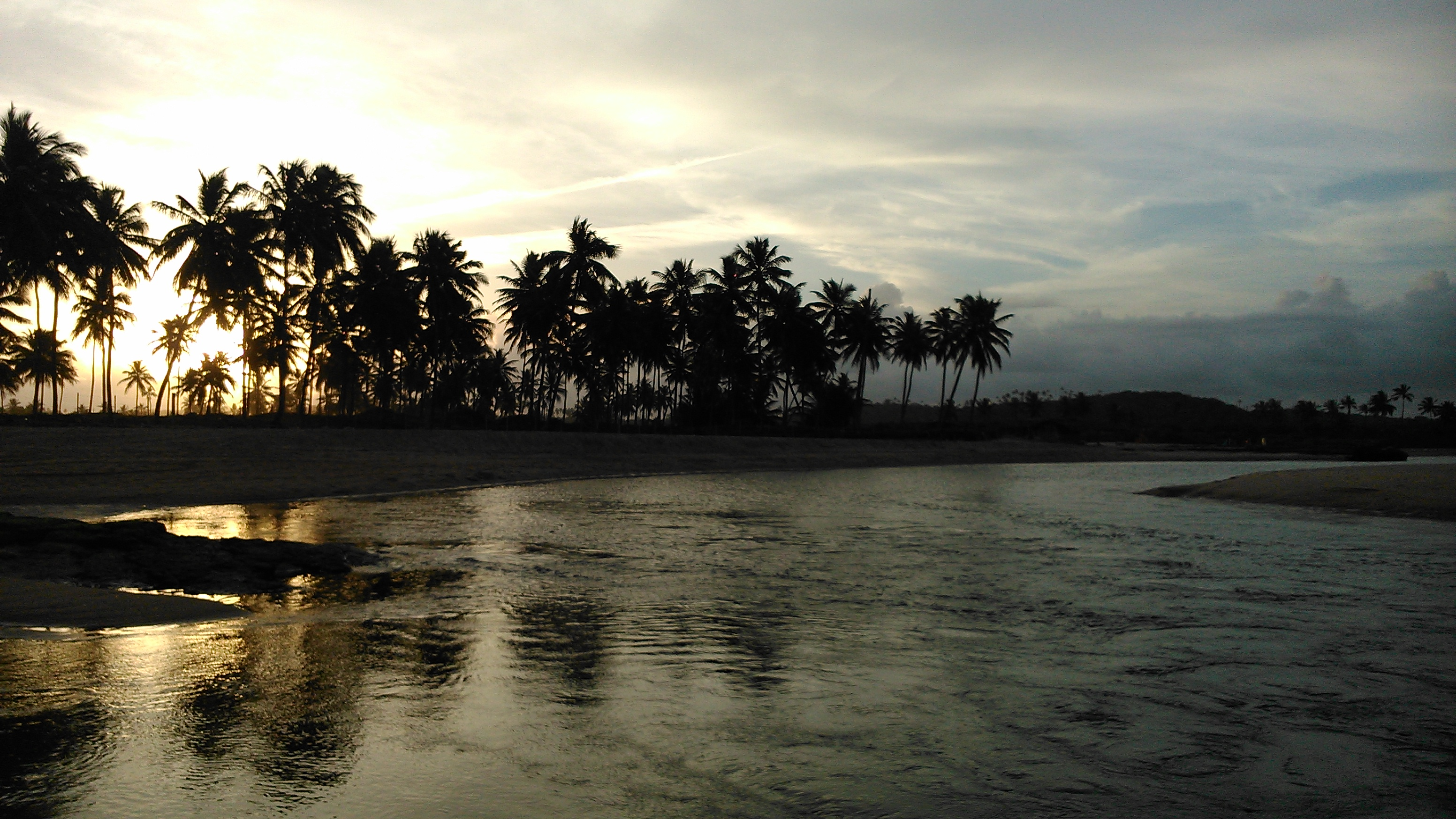 Pôr do sol na praia da Barrinha, situada em Baixio, município de Esplanada - Bahia.